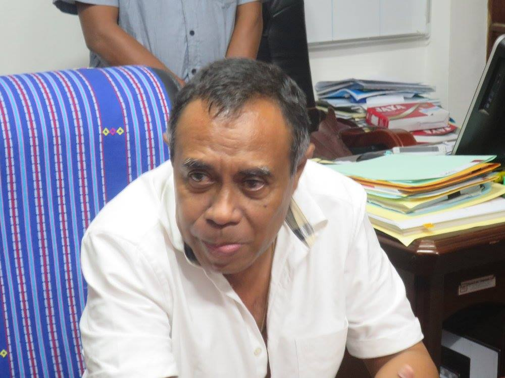 CGastão Francisco de Sousa, Minister für Bau, Transport und Telekommunikation in Osttimor